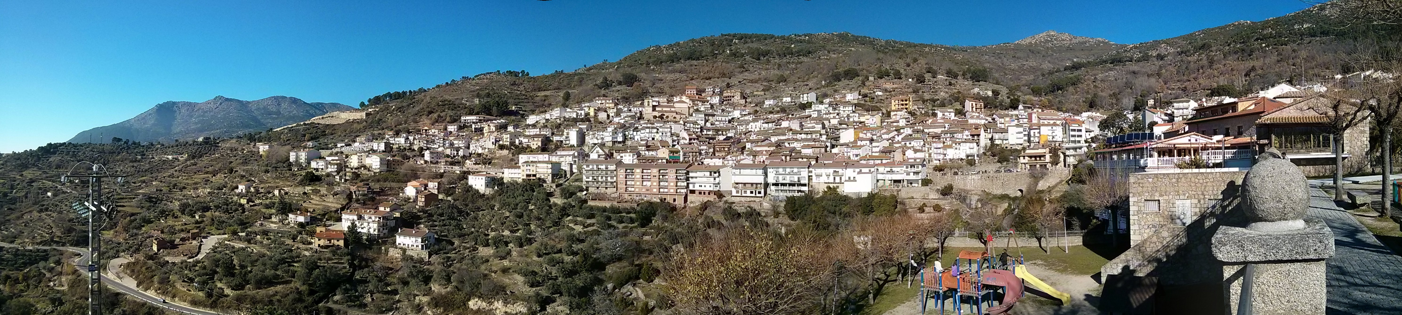 Panorámica de Pedro Bernardo, Ávila